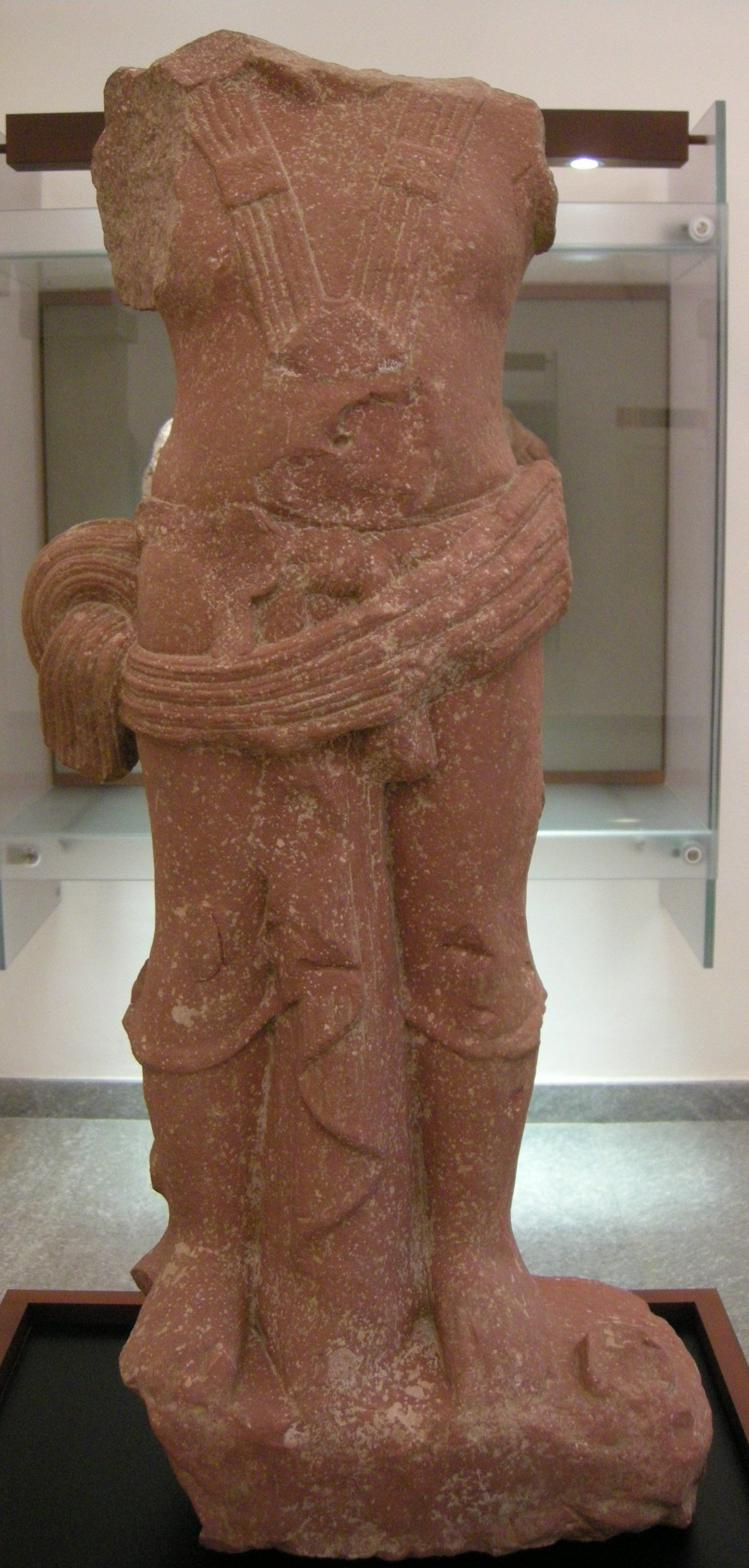 Mathura (Uttar pradesh), yaksha, I ac-I dc